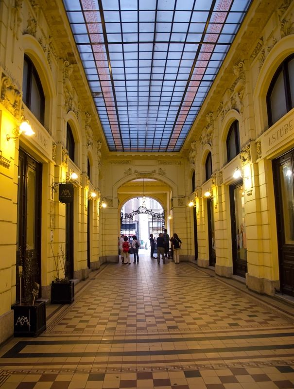 Zagreb